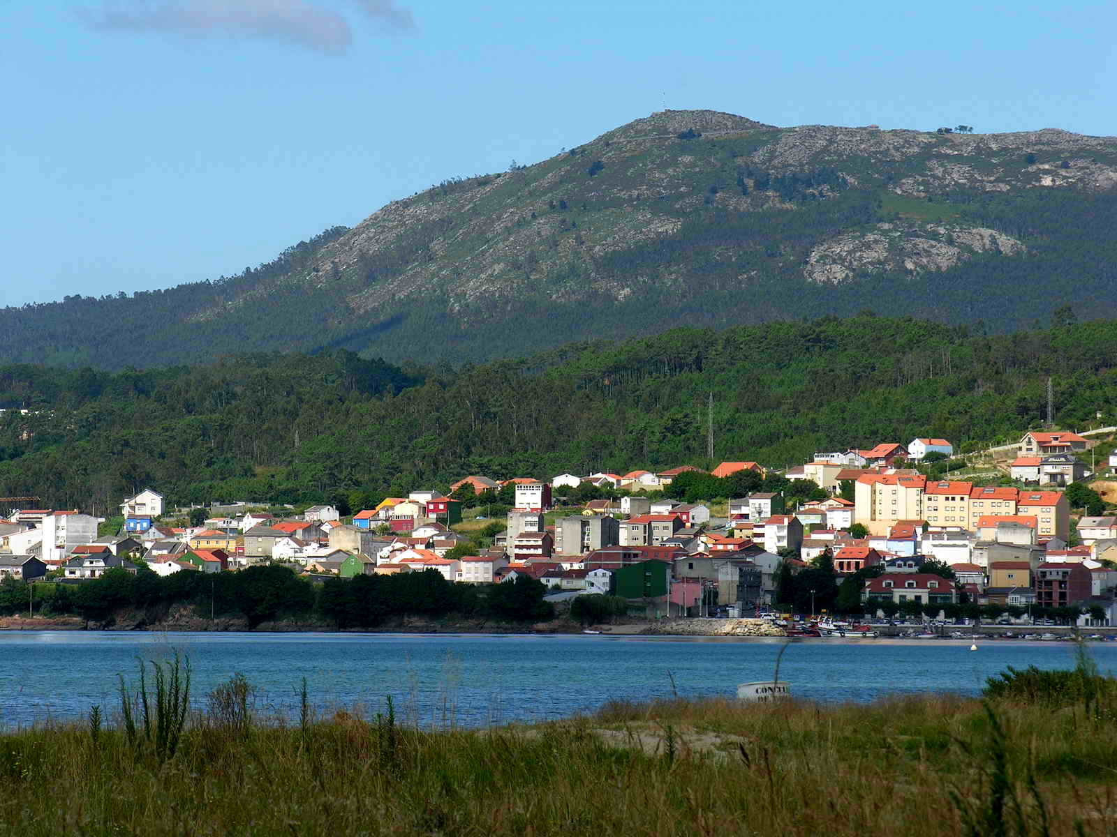 Boiro - Galicia - Spain